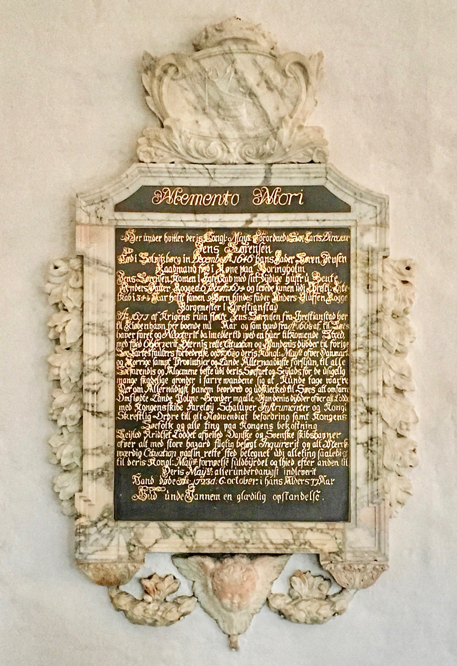 Gravminde over søkortdirektør Jens Sørensen (1646-1723) , Kapelsalen, Holmens Kirke, København